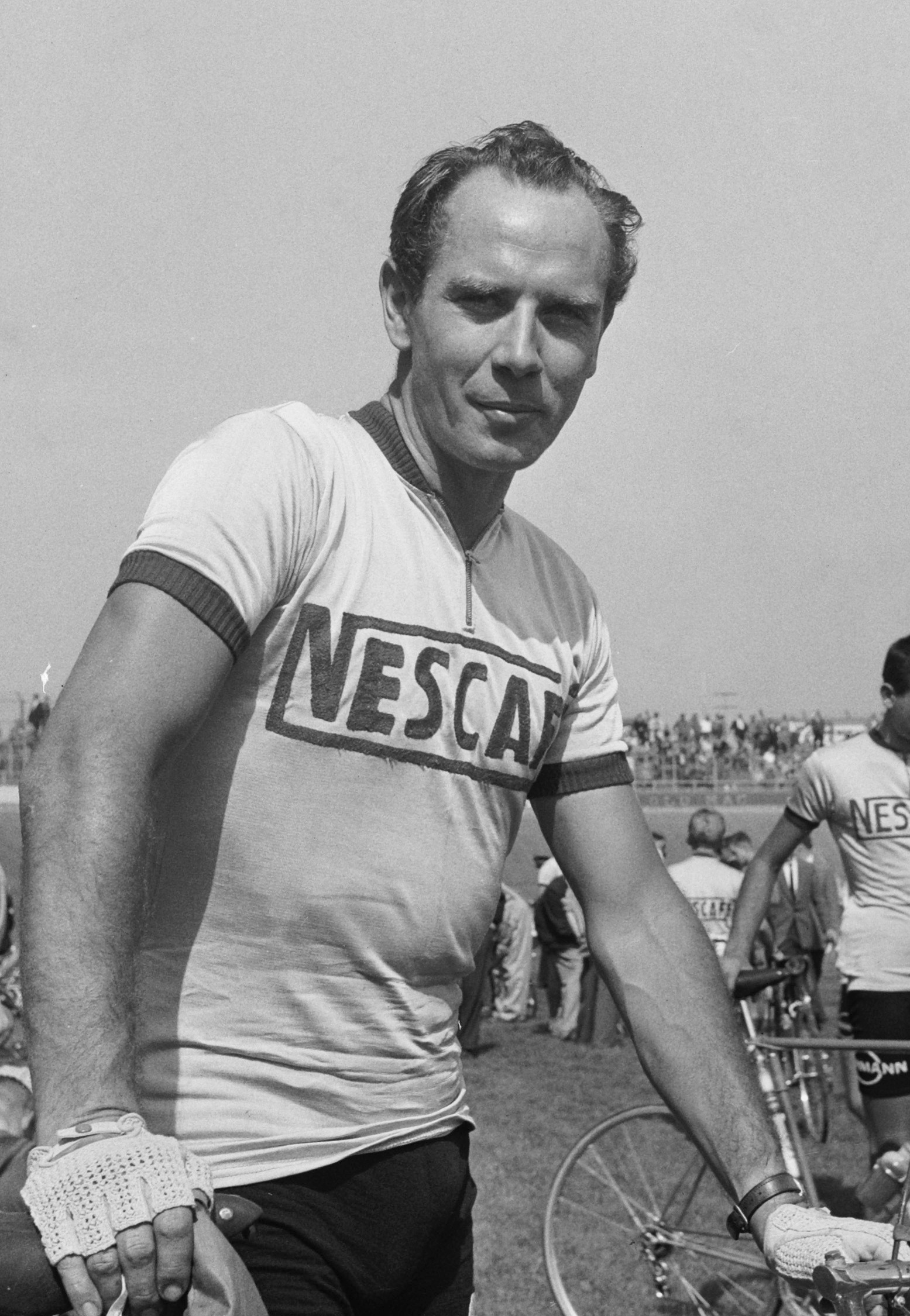 Start Ronde van Nederland Stadion Utrecht . Hugo Koblet